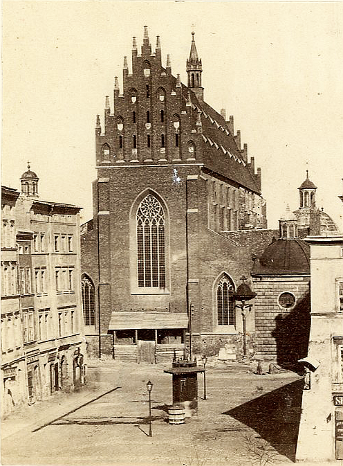 Kościół św. Trójcy (dominikanów) w Krakowie